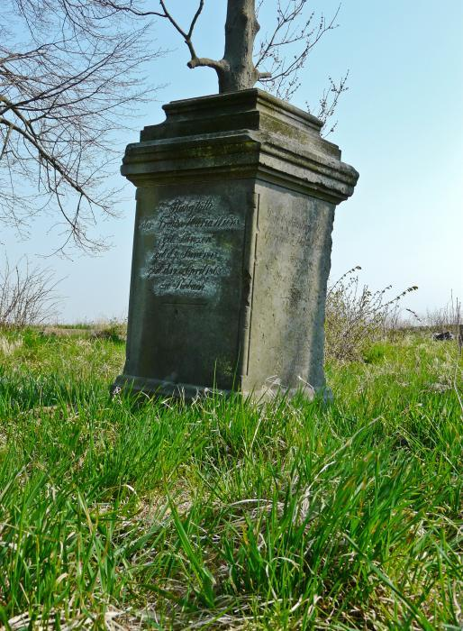 Lipinka - nagrobek rodziny Wiens z lat 1865 - 1885 w formie cippusa